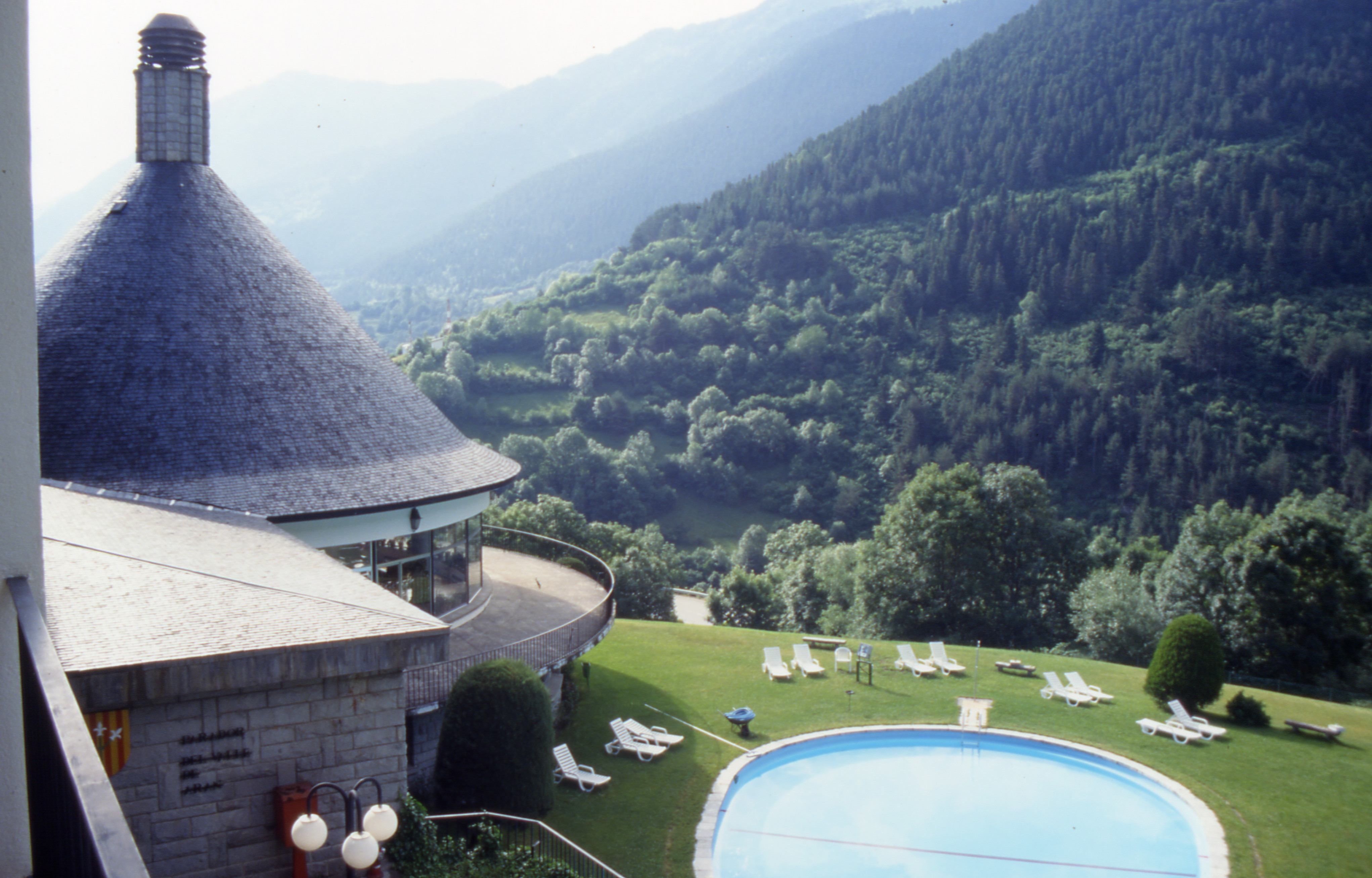 VielhaeMijaranParador